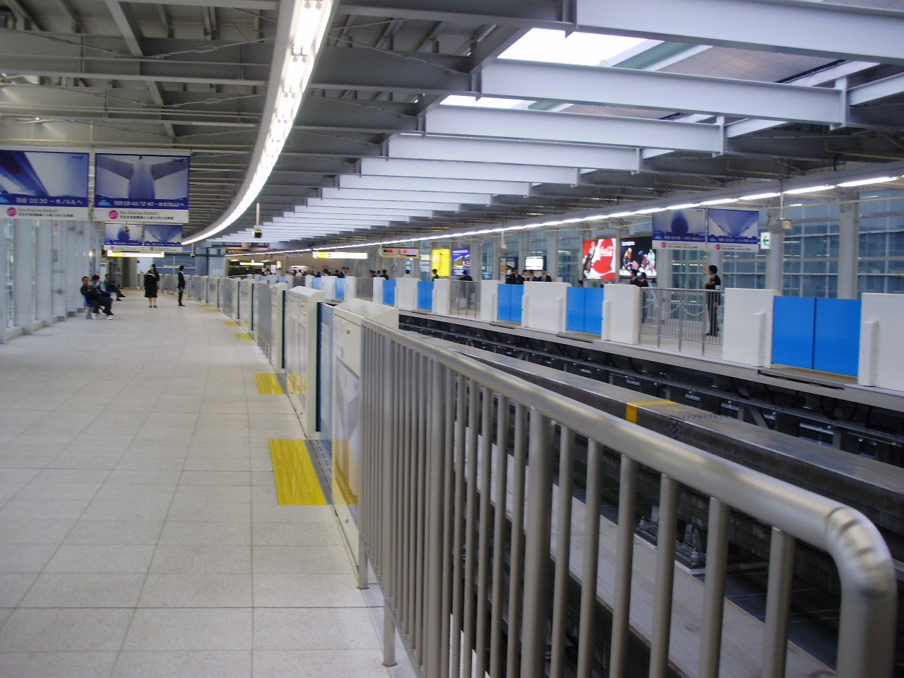 羽田空港国際線ビル駅2番線ホーム